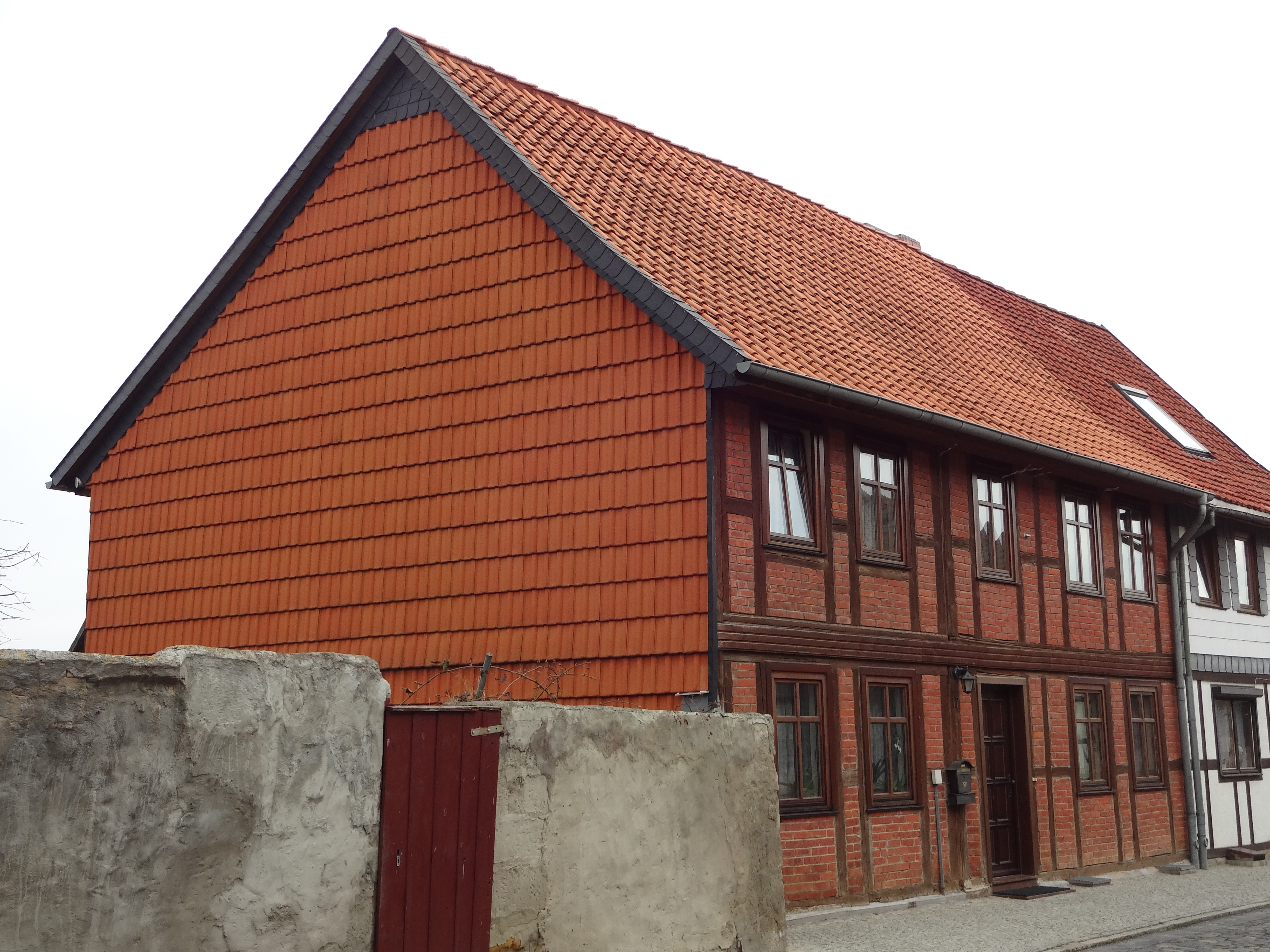 Kulturdenkmal Mittlere Mauerstraße 17 in Derenburg